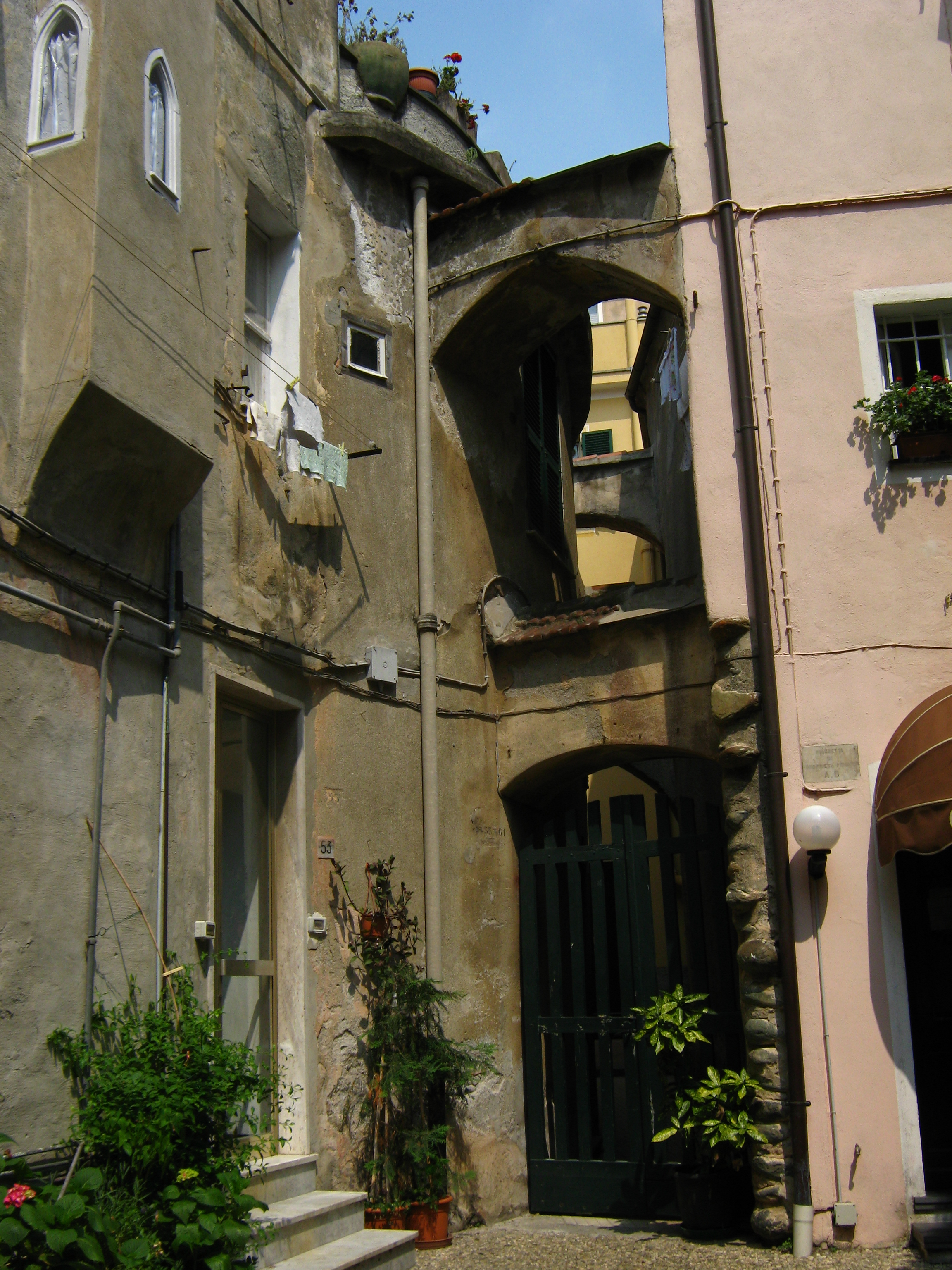 Piazzetta del Fornaxin a Cogoleto